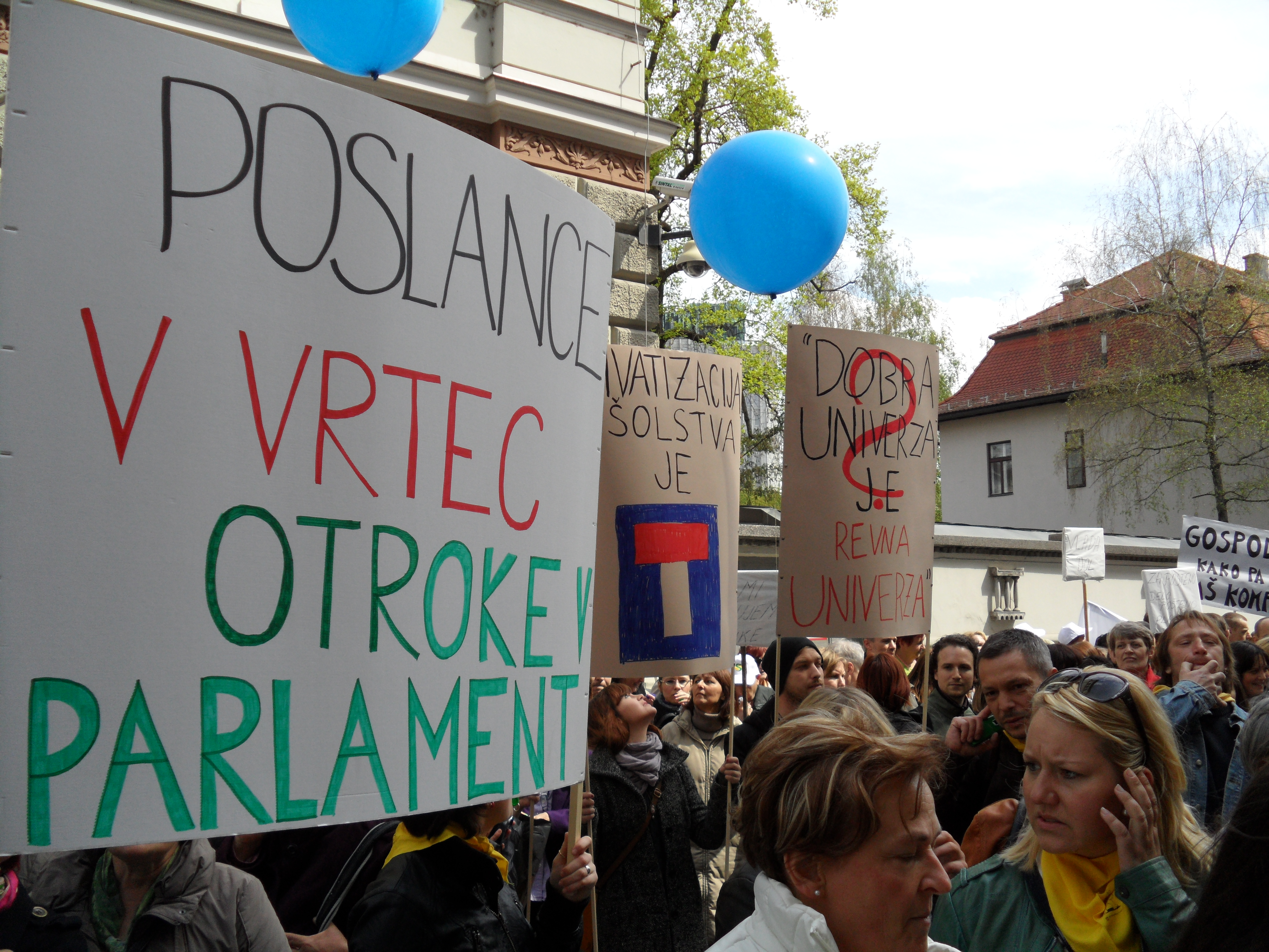 Splošna stavka javnega sektorja pred vladno palačo, Gregorčičeva ulica, Ljubljana